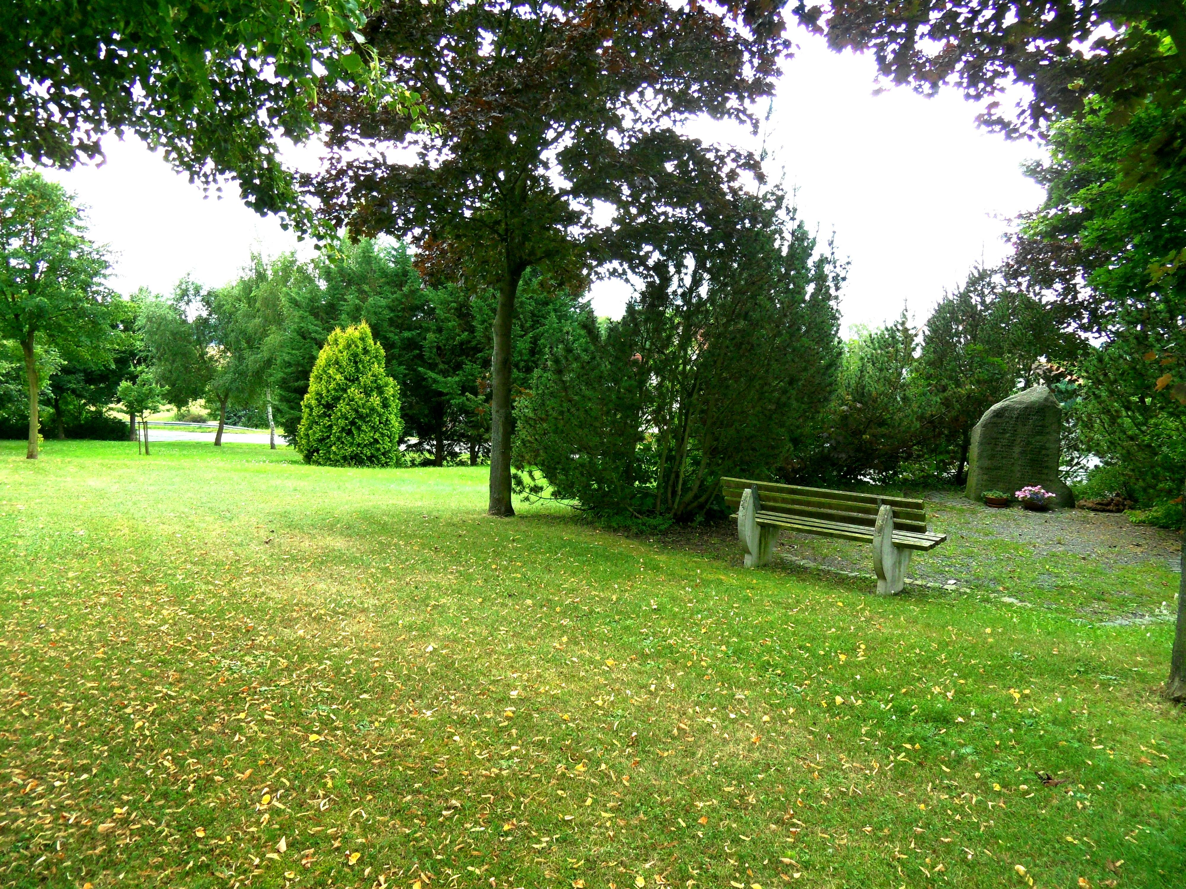 Freizeitanlage "Reitbahn" mit Ehrenmal (rechts)